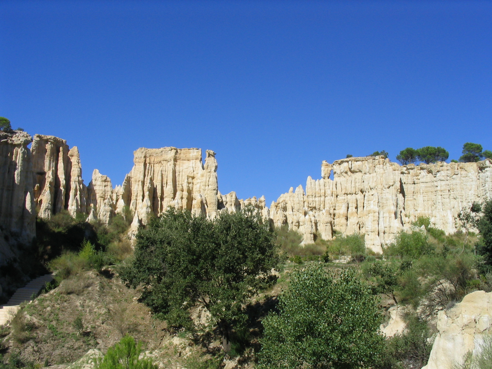 Les Orgues d'Ille-sur-Têt (Pyrénées-Orientales, France), une curiosité géologique.